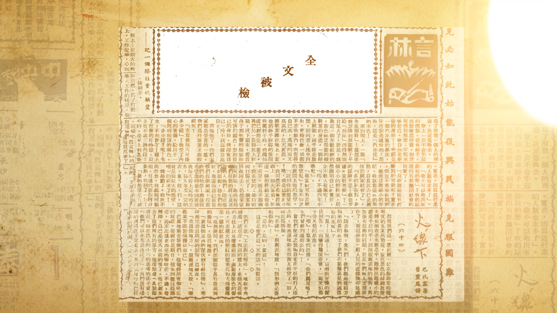 1937年中日戰爭爆發，香港亦經歷嚴緊的新聞檢查，報章文字被刪改的情況不時出現。